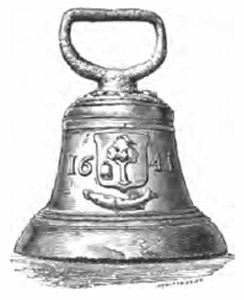 Bell, Glasgow